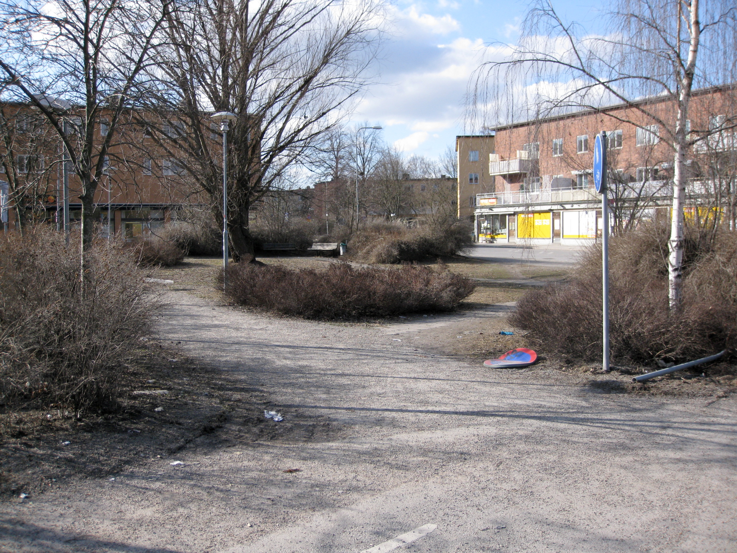 Svandammsplan i Midsommarkransen, sydvästra Stockholm.